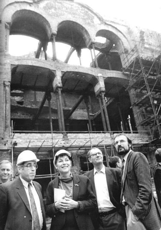 ADN-Hartmut Reiche 18.10.90 Berlin: Synagoge Über den Stand des Wiederaufbaus der Neuen Synagoge in der Oranienburger Straße informierte sich die Berliner Kultursenatorin Anke Martiny (2.v.l., SPD) im Beisein des Direktors und des Präsidenten der Stiftung "Neue Synagoge Berlin - Centru Judaicum", Dr. Hermann Simon (l) und Dr. Peter Kirchner (2.v.r.). Schwerpunkt der 1988 begonnenen Arbeiten ist gegenwärtig die Gestaltung der Außenfassade des vorderen Gebäudetraktes.